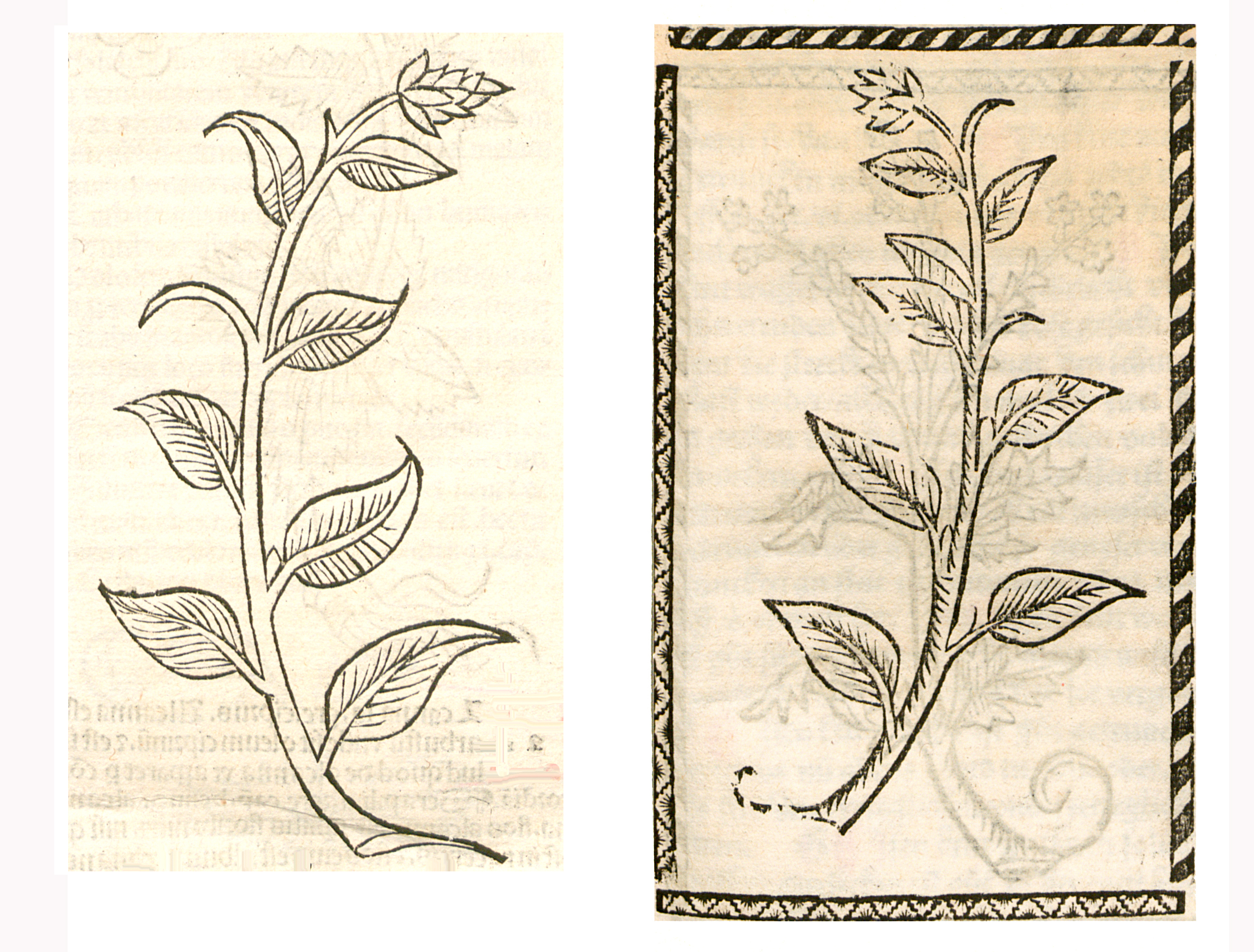 Abbildung von Heidensch Wuntkrut (Senecio nemorensis)